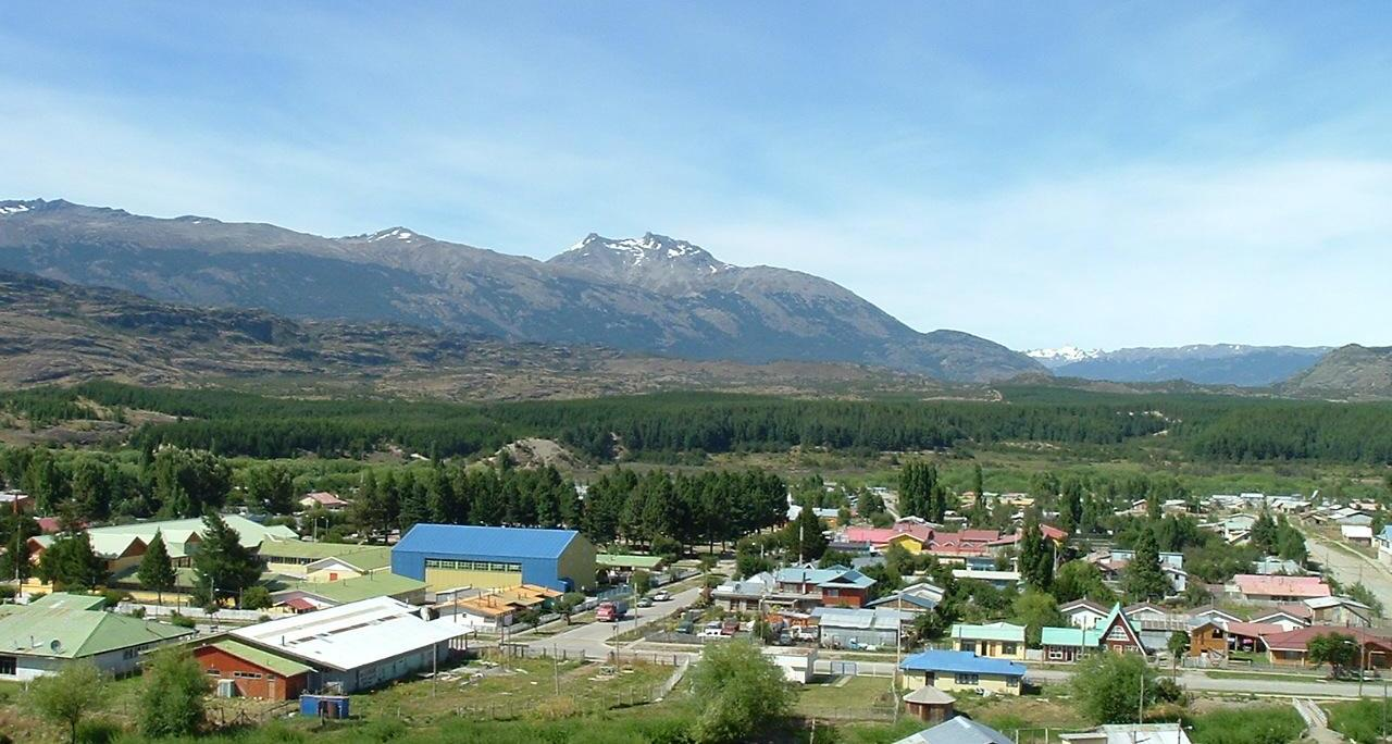 Foto panorámica de la geografía de Cochrane.